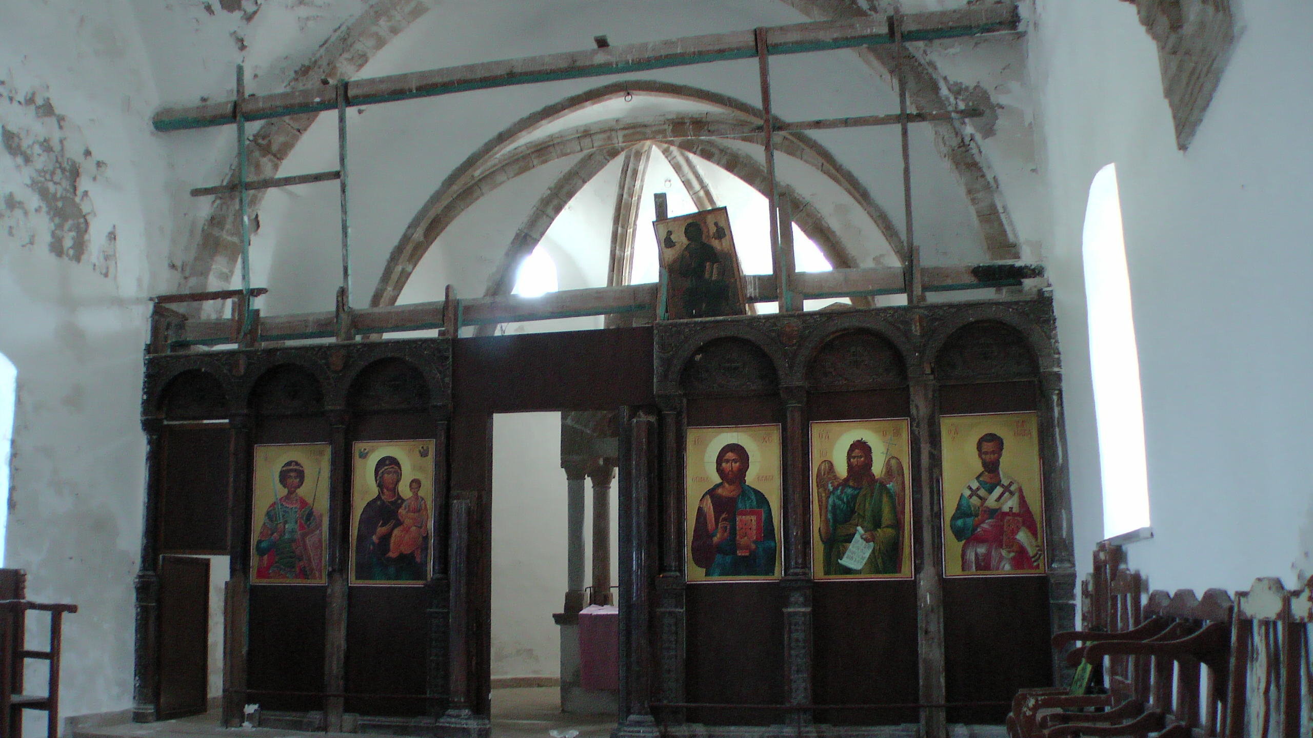 Agios Thyrsos, geplünderter Ikonostas mit neu eingehängten Ikonenpostern